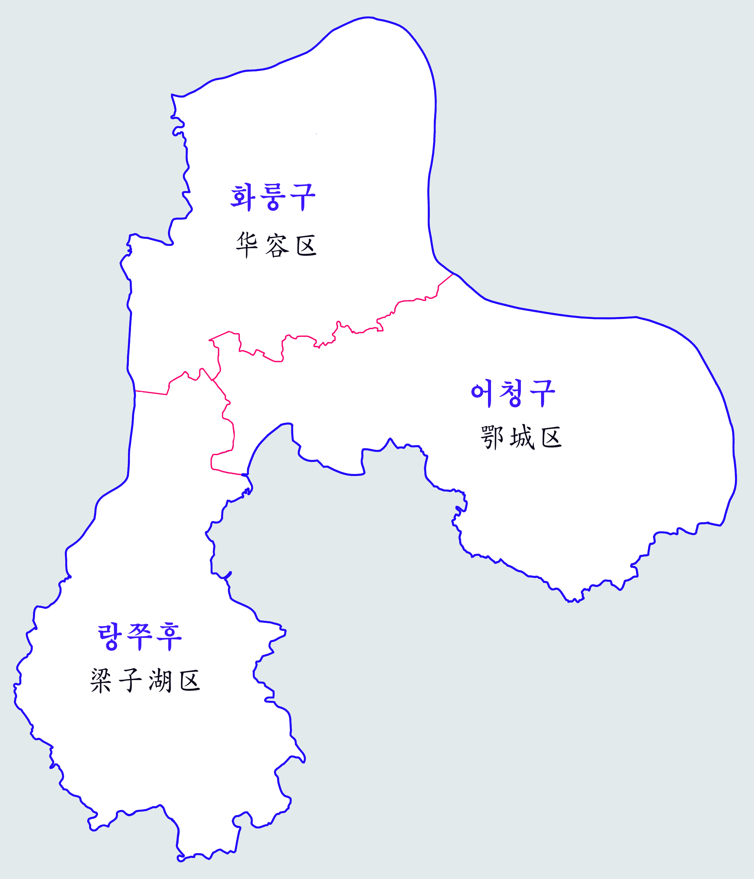 어저우시 현급 행정구역